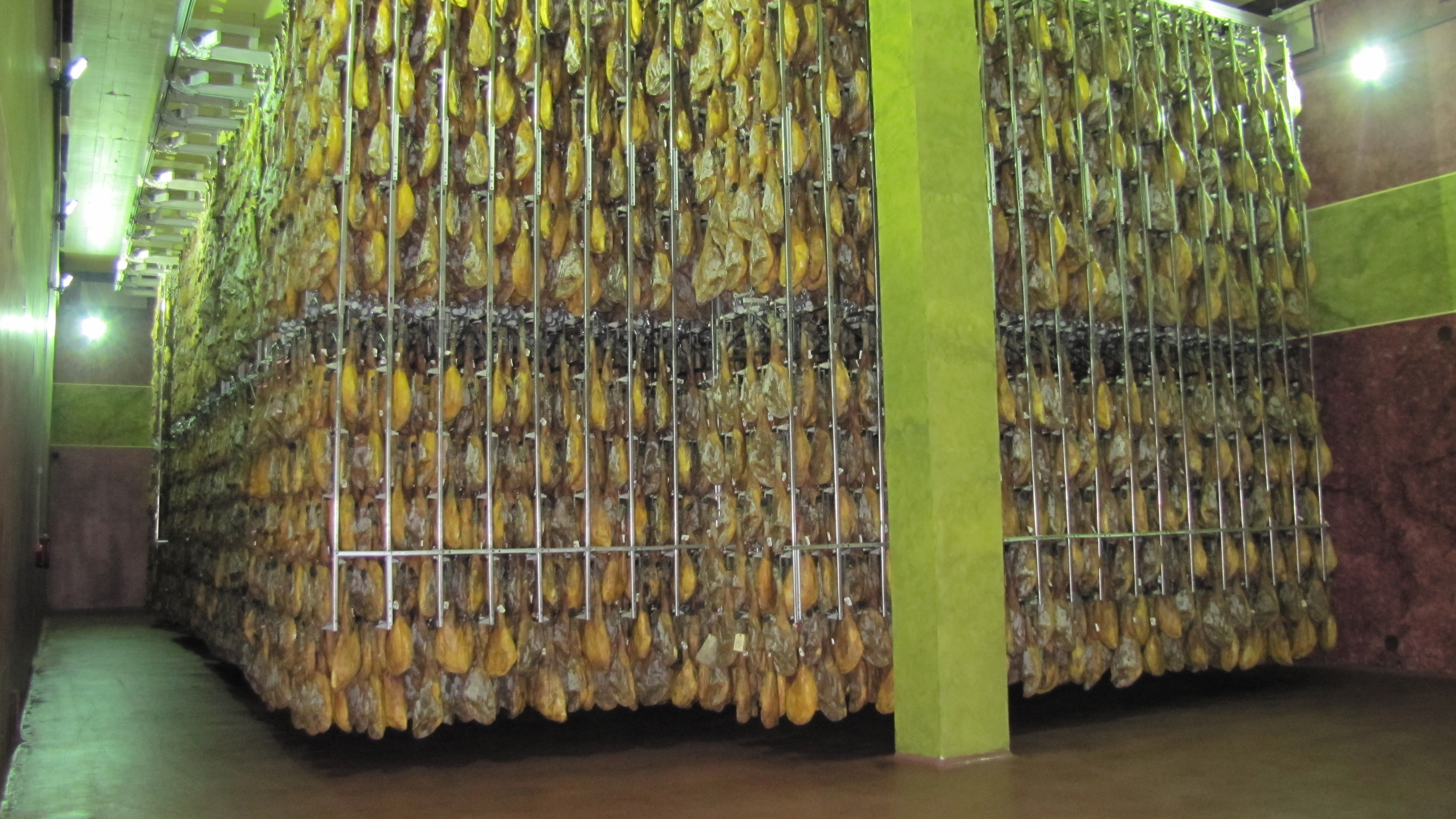 Bodega de Jamones de bellota de la empresa BEHER, Bernardo Hernandez, en la D.O. Guijuelo (Salamanca, España). Se pueden observar miles de jamones en una bodega semisubterránea, probablemente la más alta de la D.O. Guijuelo, donde los jamones pasan su última fase de curación. Los jamones pasan un año o dos, según sean de recebo o de bellota.